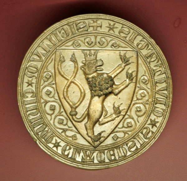 Kladsko1.městské pečetidlo - kopie